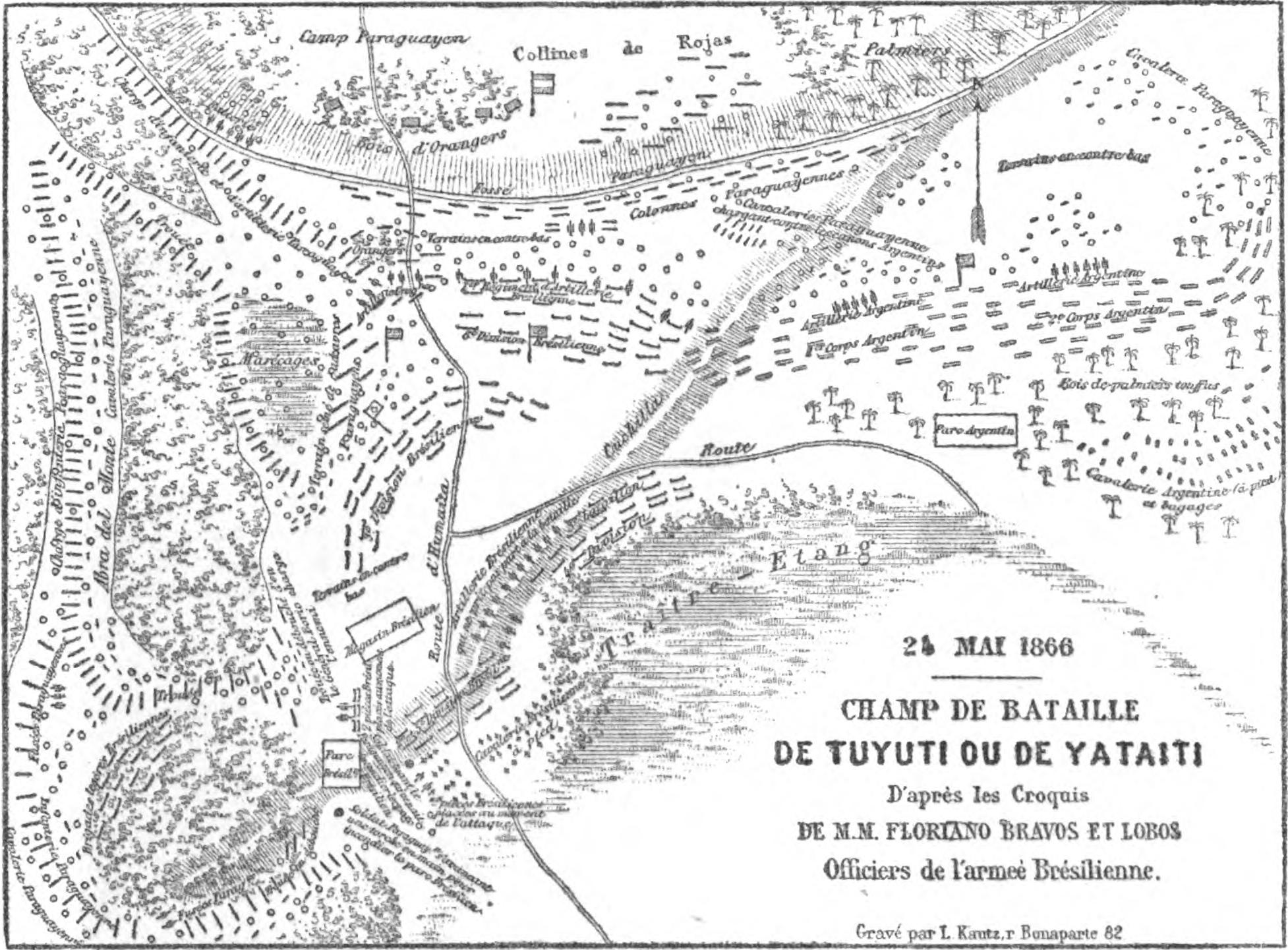 Champ de Bataille de Tuyuti ou de Yataiti (24 mai 1866).